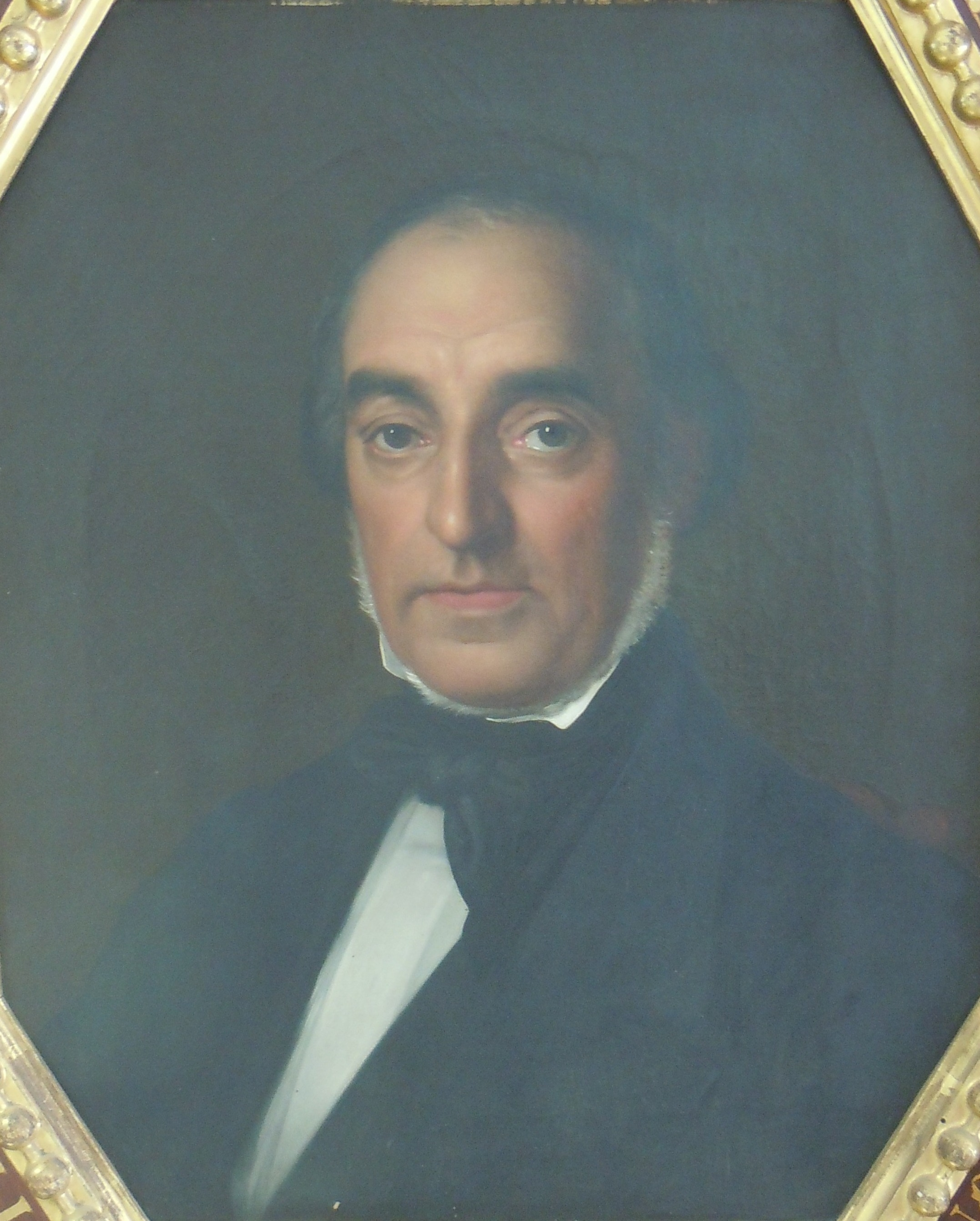 Alessandro Mazzanti, Ritratto di Pietro Vannoni. Firenze, Università degli Studi, Scuola di Scienze della Salute Umana